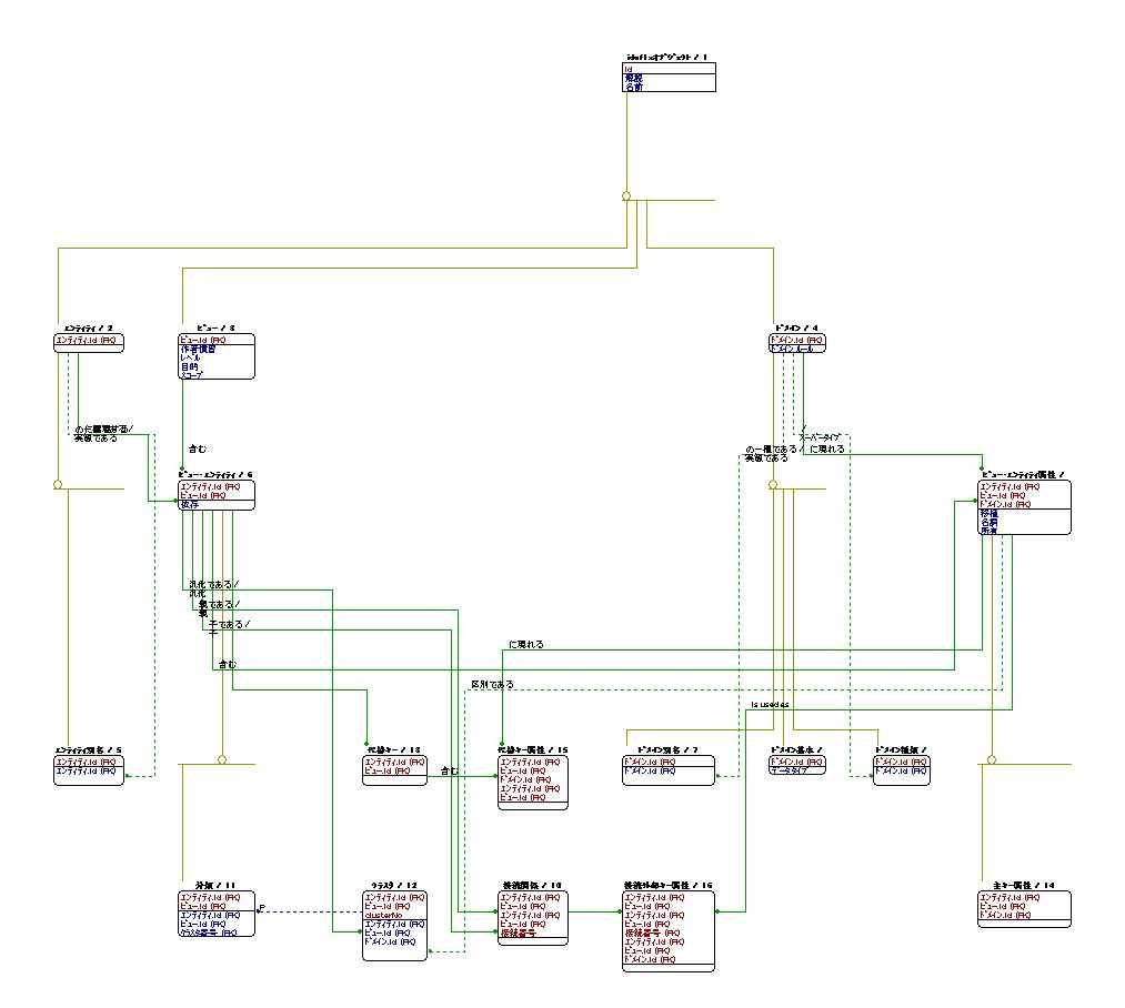 米国NISTのFIPS１３４であるIDEF1Xのメタモデル（英文Wikipedia掲載）をIDEF1Xツールを使って日本語化したものである。